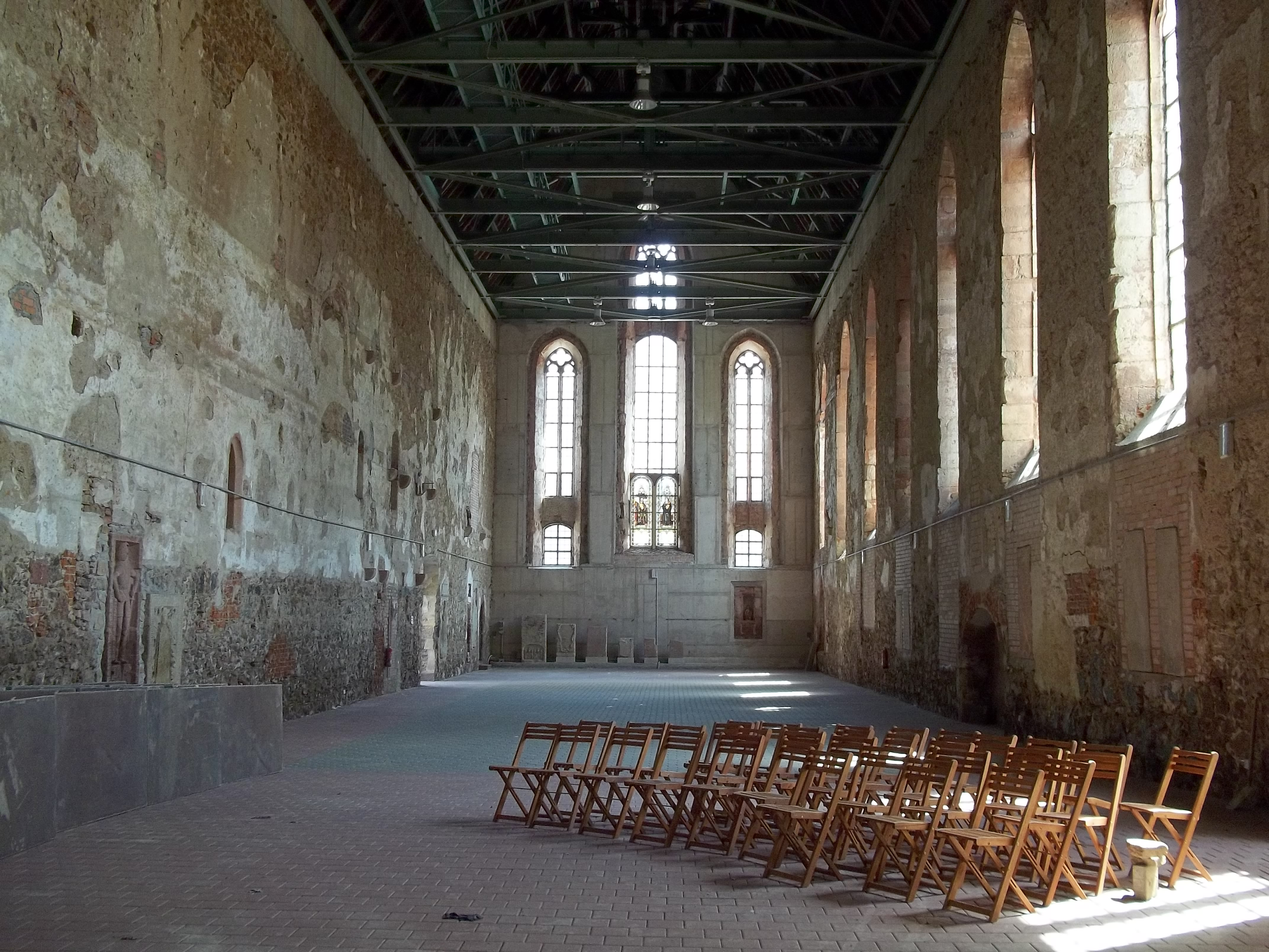 Blick in den Sakralbau / in die Saalkirche, die nicht mehr als Kirche, sondern als Konzert- und Kulturhalle genutzt wird - Foto: Holger Zürch